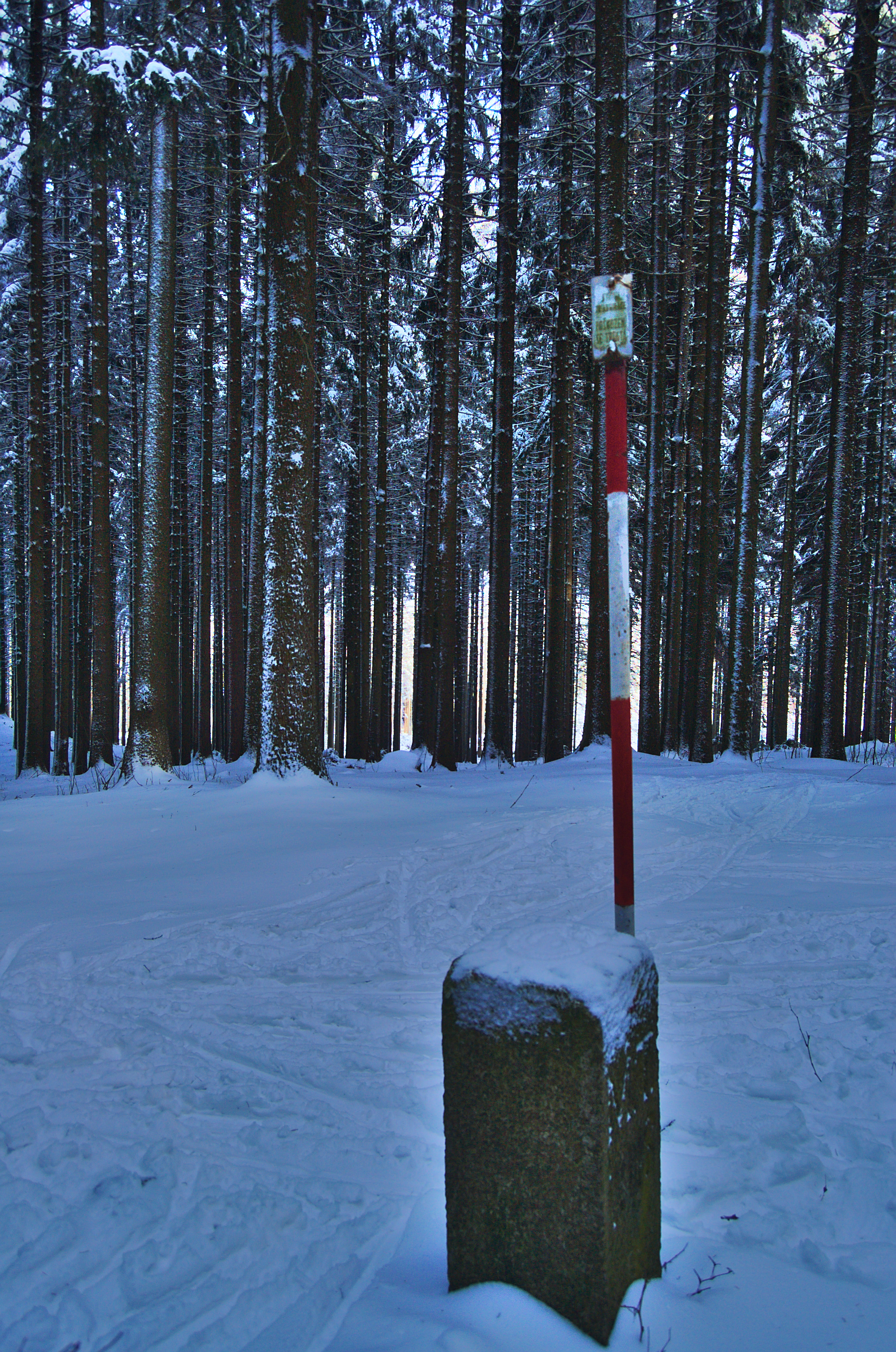 Paprč, Benešov, okres Blansko